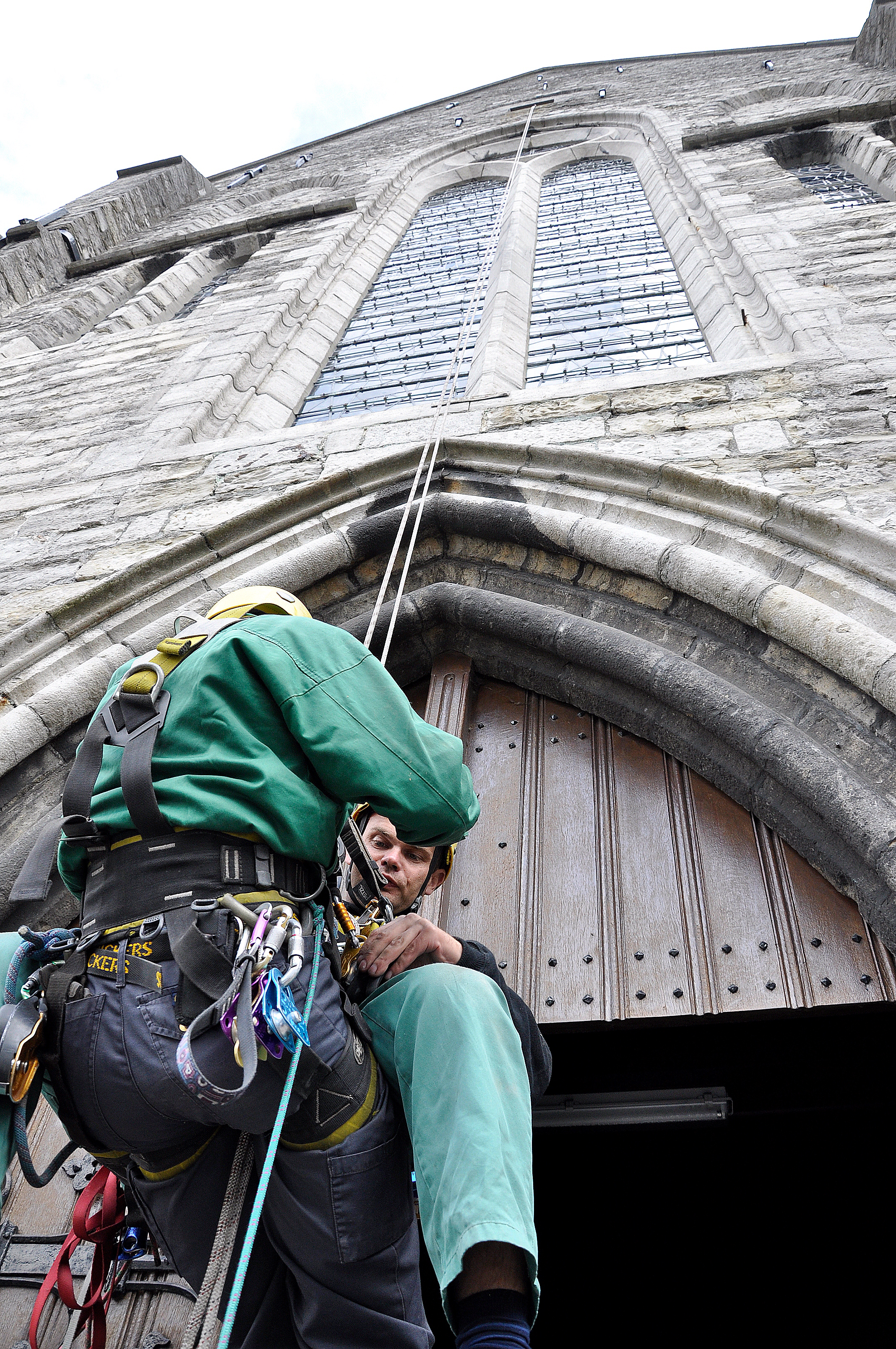 Monumentenzorg Oost-Vlaanderen controleert de Onze-Lieve-Vrouwekerk van Pamele, Oudenaarde, België op haar stabiliteit.